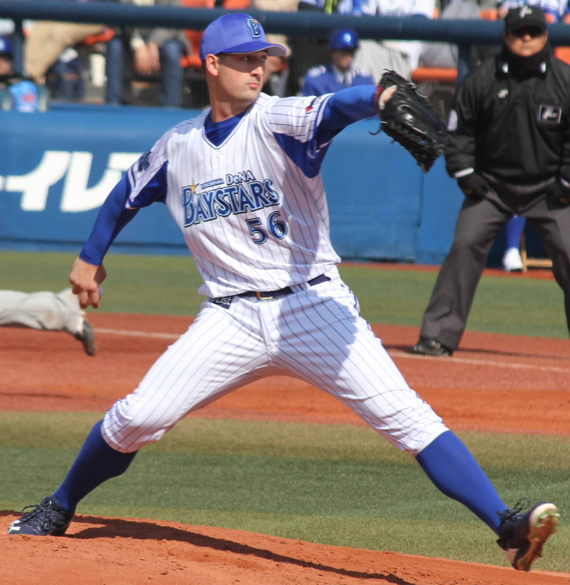 横浜DeNAベイスターズ投手のジョー・ウィーランド。横浜スタジアムにて。